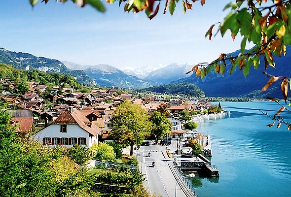 Brienz von der Kirche her gesehen